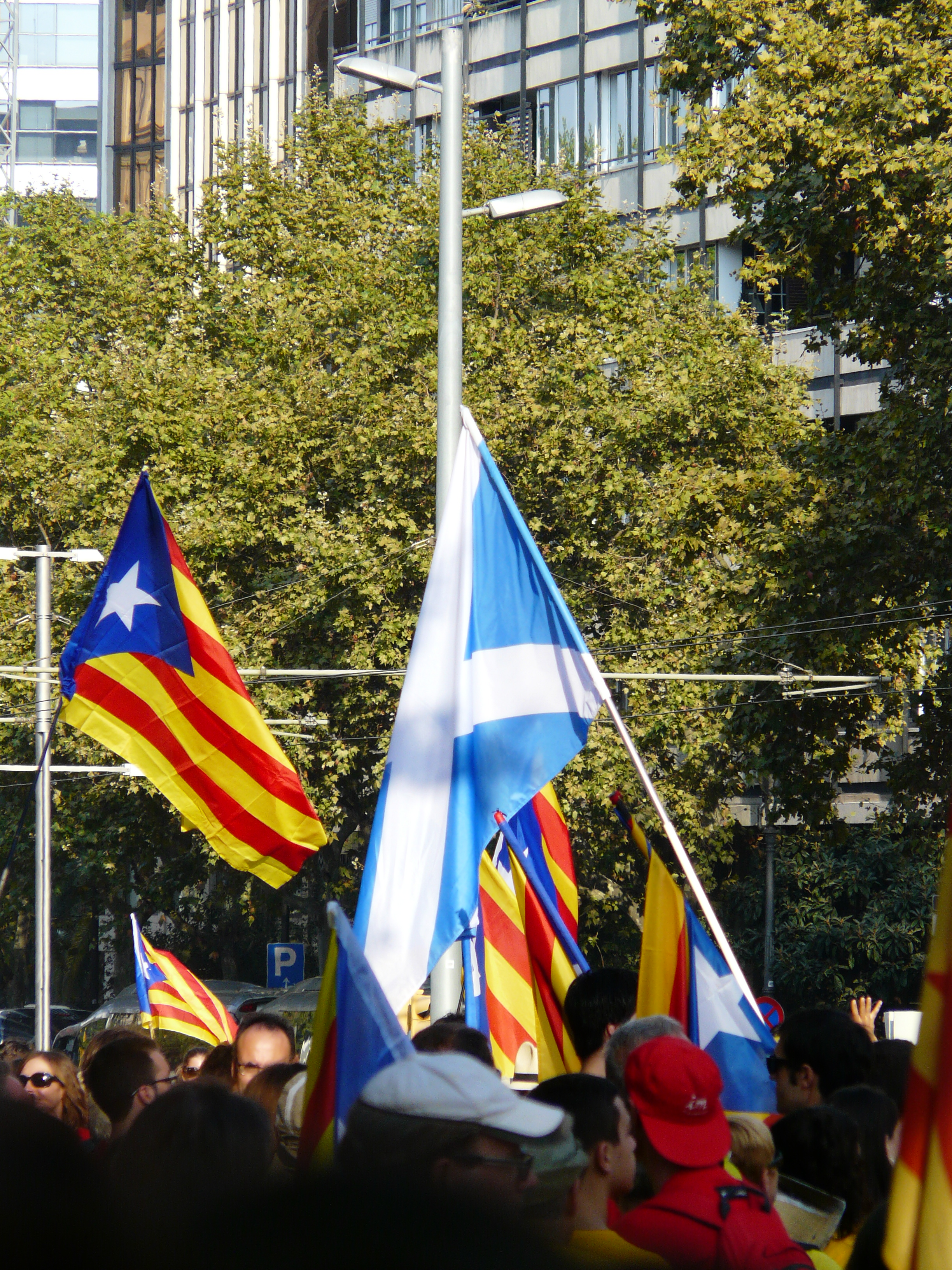 V Catalana, branca de la Diagonal.